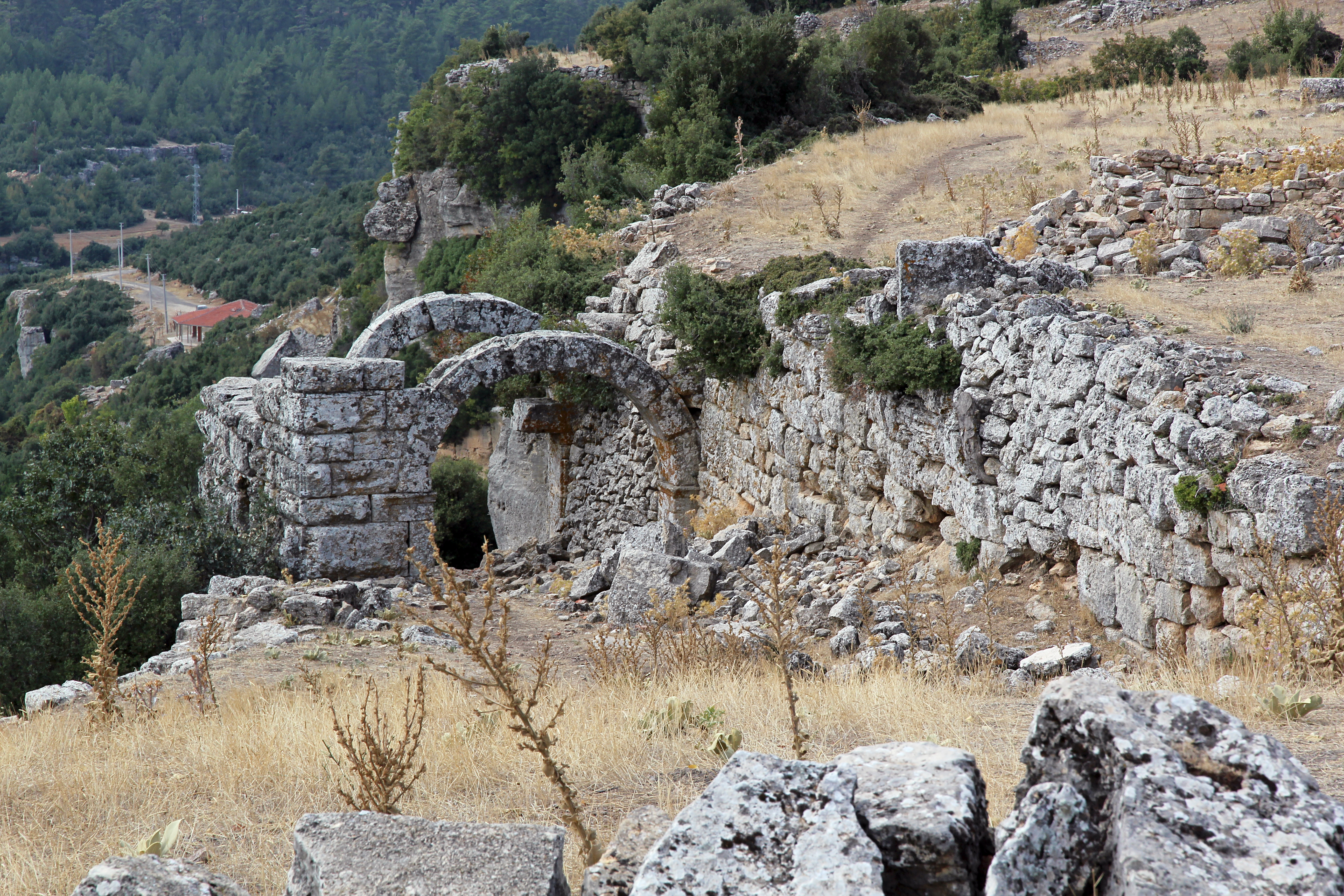 Kremna, antike Stadt in Pisidien, Südtürkei, Südtor